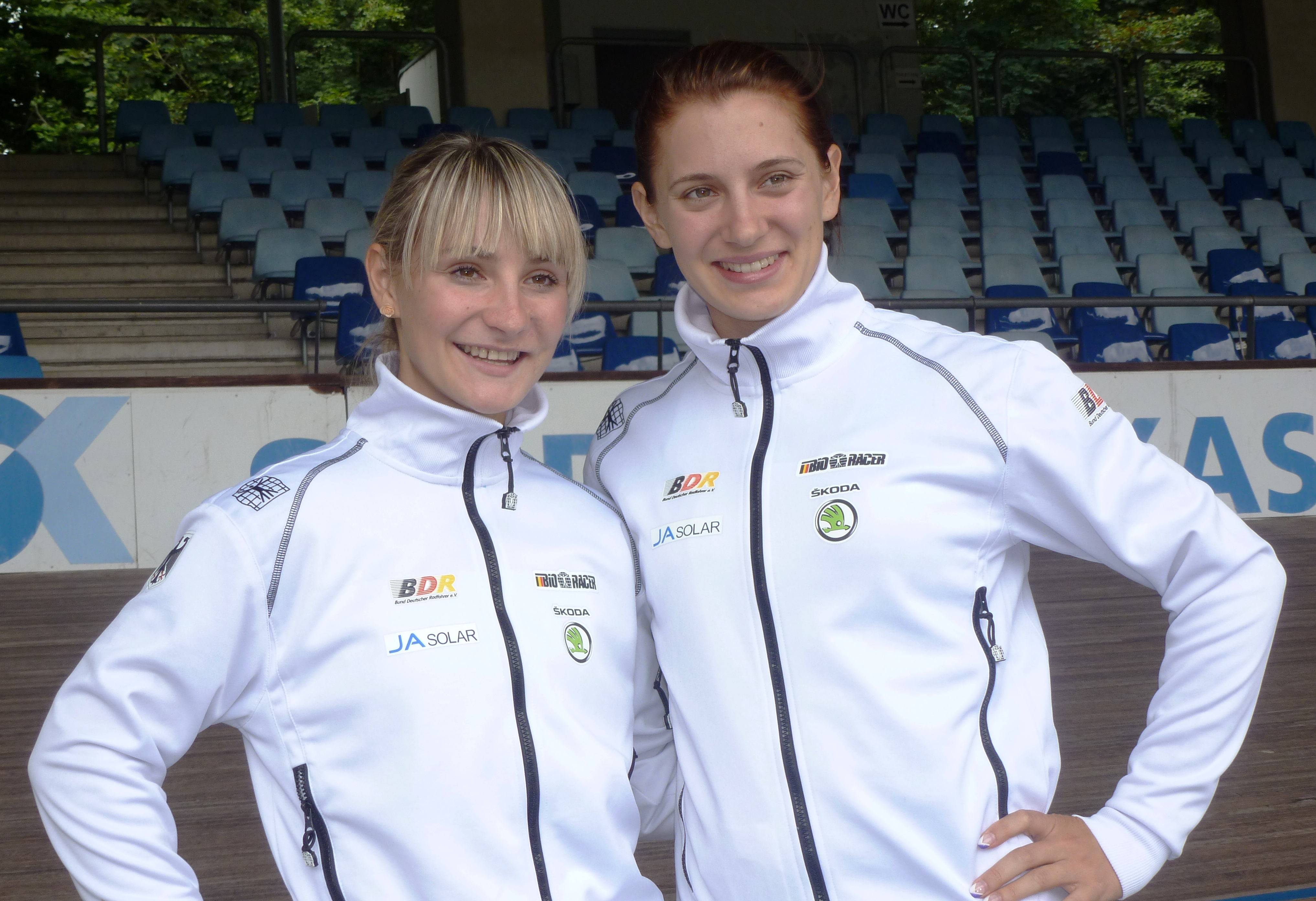 Kristina Vogel (l.), Miriam Welte, deutsche Bahnradsportlerinnen